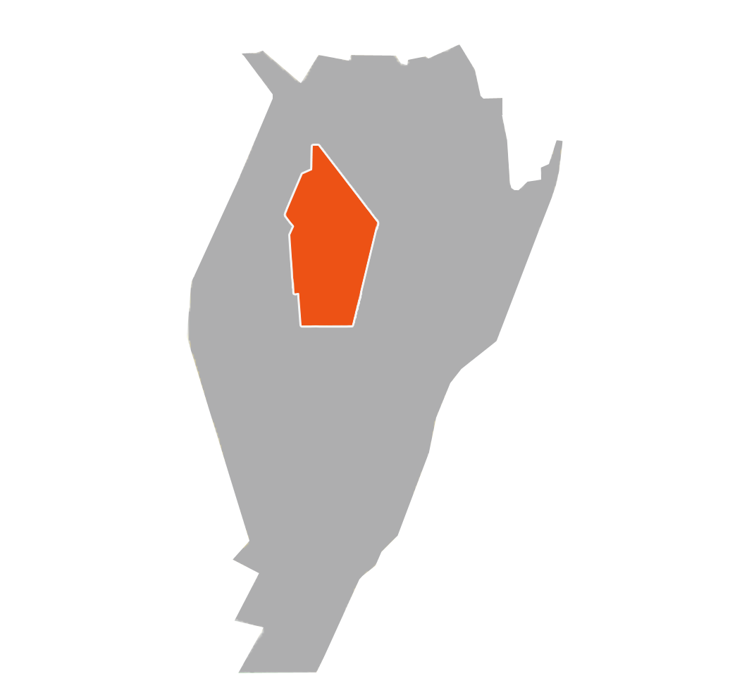 Pozitionarea cartierului Chercea pe harta orasului Braila